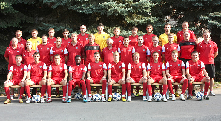 ФК Кривбасс в 2011году